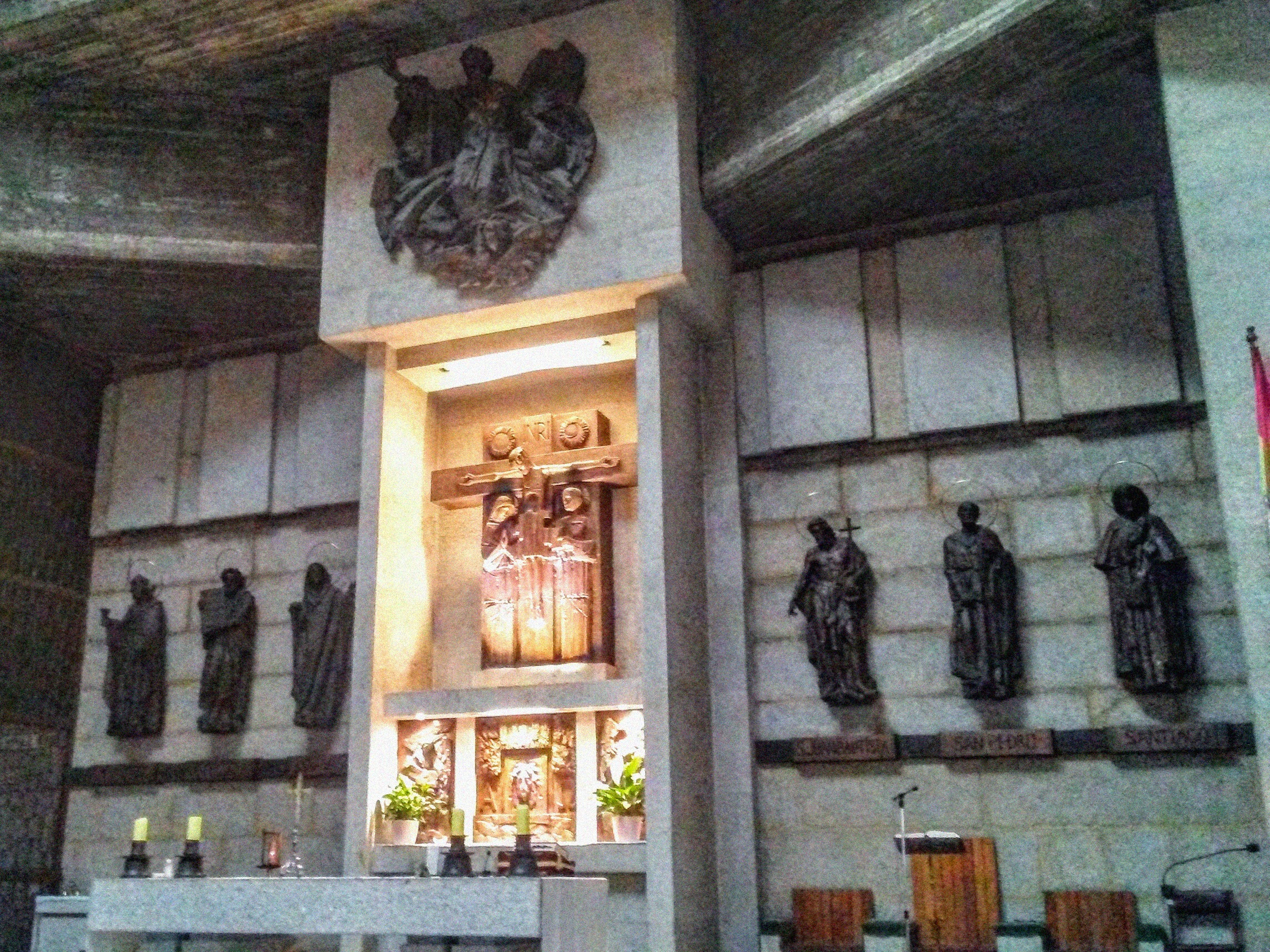 Parroquia de San Ginés, Sanxenxo